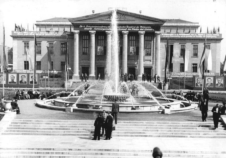 Chemnitz, Kulturpalast, Springbrunnen Zentralbild Seidel No Sch. Blick auf den Kulturpalast der Wismut A.G. in Chemnitz, ( jetzt Karl-Marx-Stadt ) In dem am 28.6.52 die VI. Delegiertenkonferenz der Parteiorganisation Wismut stattfand.